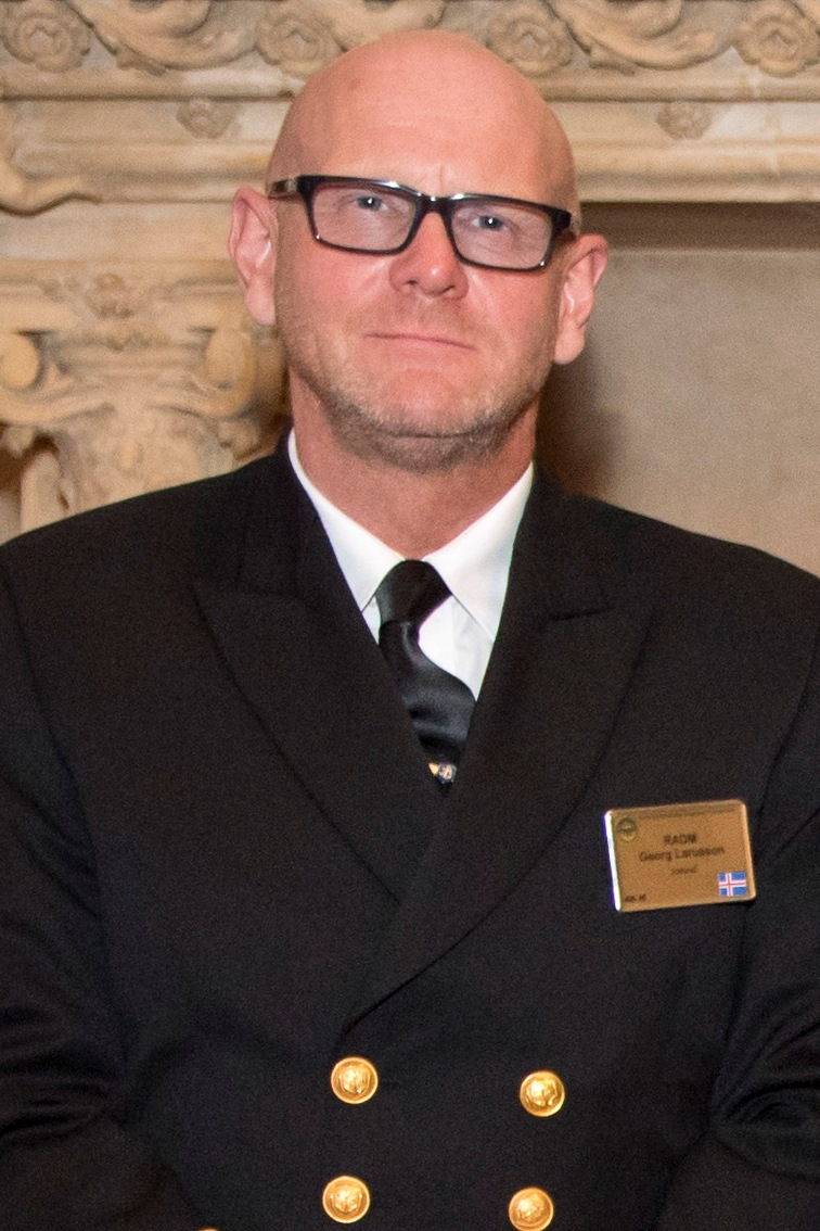 Georg Kristinn Lárusson